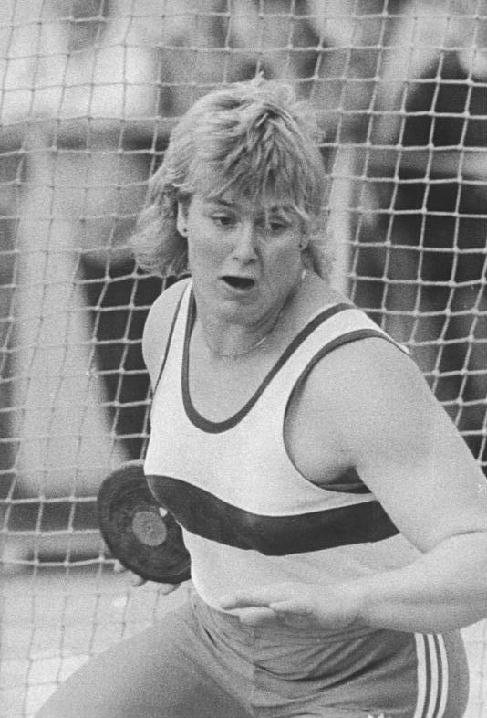 Ilke Wyludda ADN-ZB Oberst 13.9.88-kd-Berlin: Leichtathletik-Meeting zur Verabschiedung der Olympiastarter- Im Diskuswerfen der Frauen erreichte mit 74,40 m Ilke Wyludda (SC Chemie Halle) als Zweitplazierte einen neuen Junioren-Weltrekord.